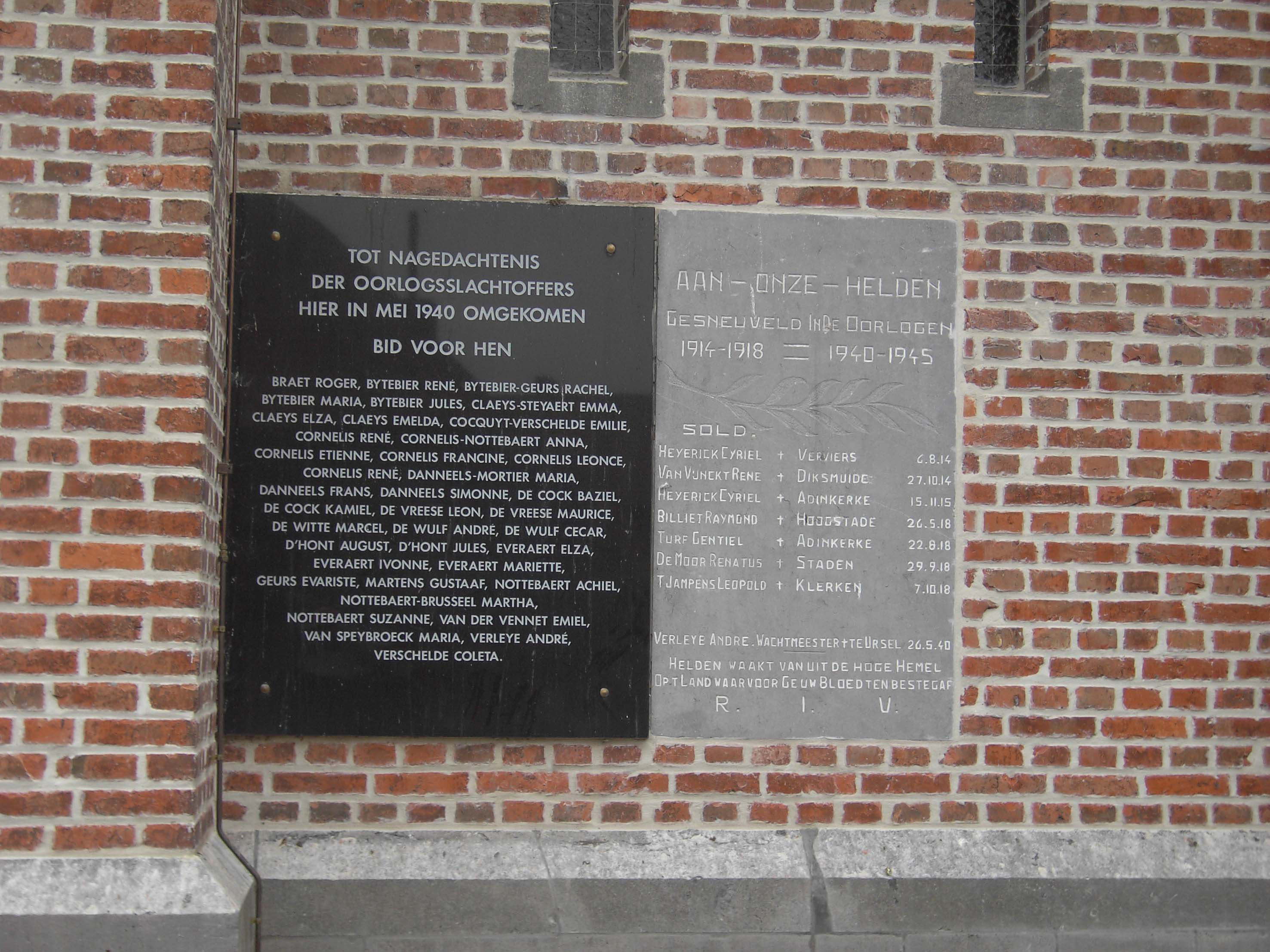 Gevel van de kerk van Meigem - Deinze - Oost-Vlaanderen - België